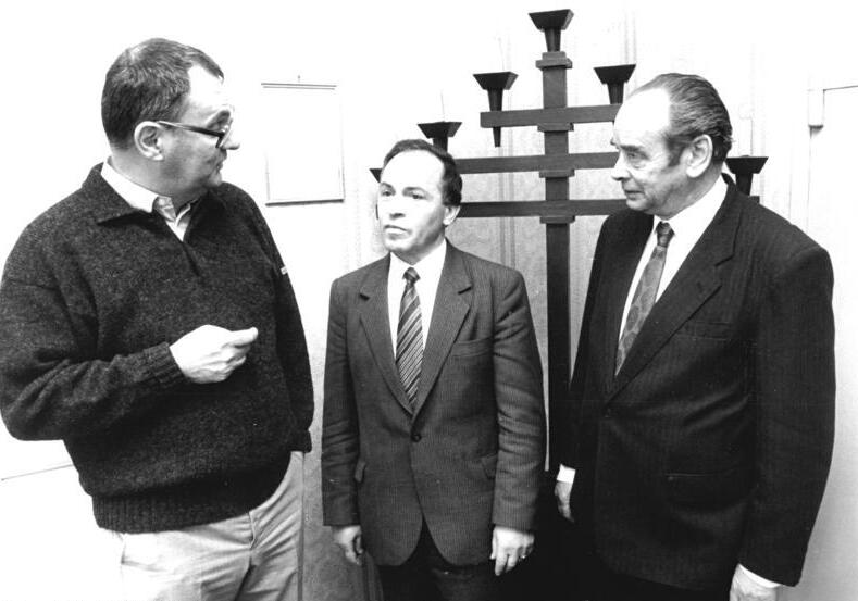 ADN-ZB-Hiekel-13.3.88-Dresden: Der neue Vorstand des Verbandes der Jüdischen Gemeinden der DDR wurde gewählt. v.l. Dr. Peter Kirchner, Vizepräsident und Vorsitzender der Jüdischen Gemeinde Berlin, Siegmund Rotstein, Präsident und Vorsitzender der Jüdischen Gemeinde Karl-Marx-Stadt, Hans Levy, Vizepräsident und Vorsitzender der Synagogegemeinde Magdeburg.